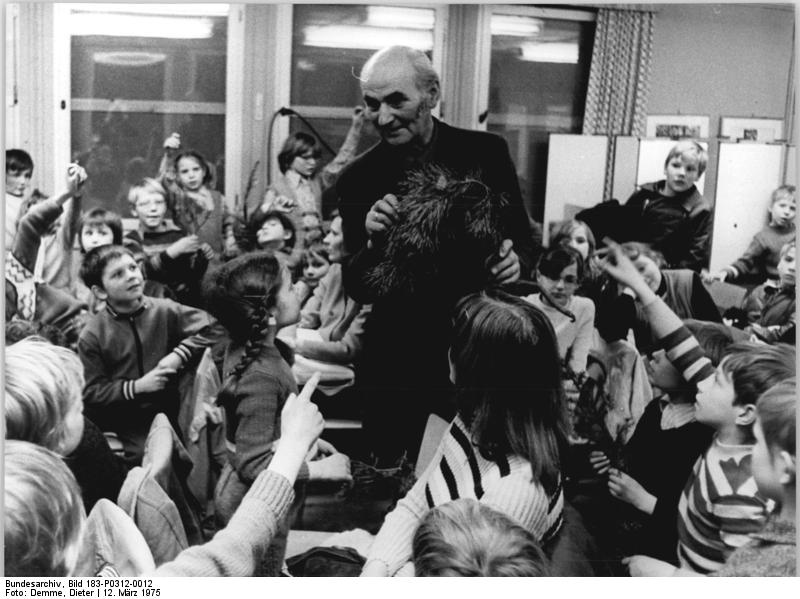 Weimar, Naturkundlicher Vortrag für Schüler ADN-ZB Demme 12.3.1975 Bez. Erfurt: In der Weimarer Station "Junge Naturforscher" fand ein Vortrag von Forstingenieur Günter Schinner über den Wald großes Interesse bei Schülern der 2. bis 5. Klasse aus verschiedenen Weimarer Schulen. "Grünrock" Schinner ist seit zwei Jahrzehnten Gast der Station, in der es die verschiedensten Arbeitsgemeinschaften gibt. Auch an den Schulen und Horten der Stadt gibt es außerdem 15 Zirkel, die von Mitarbeitern der Station betreut werden. (sihe auch 13N)